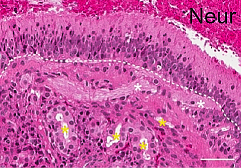 Fig. 1. Caracterización del epitelio olfativo humano. Tinción con hematoxilina-eosina de la muestra neuronal (Neur). Los asteriscos blancos indican las fibras del axón. Los asteriscos amarillos indican las glándulas de Bowman. Barra de escala= 100 μm.